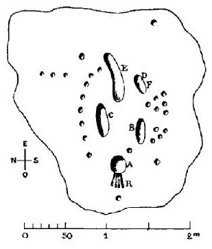 La Pierre gravée de Penhoat en Saint-Coulitz (dessin de Paul du Chatellier, publié dans "Exploration des tumulus des Montagnes Noires (Finistère)", revue "Bulletin archéologique du Comité des travaux historiques et scientifiques", 1901)